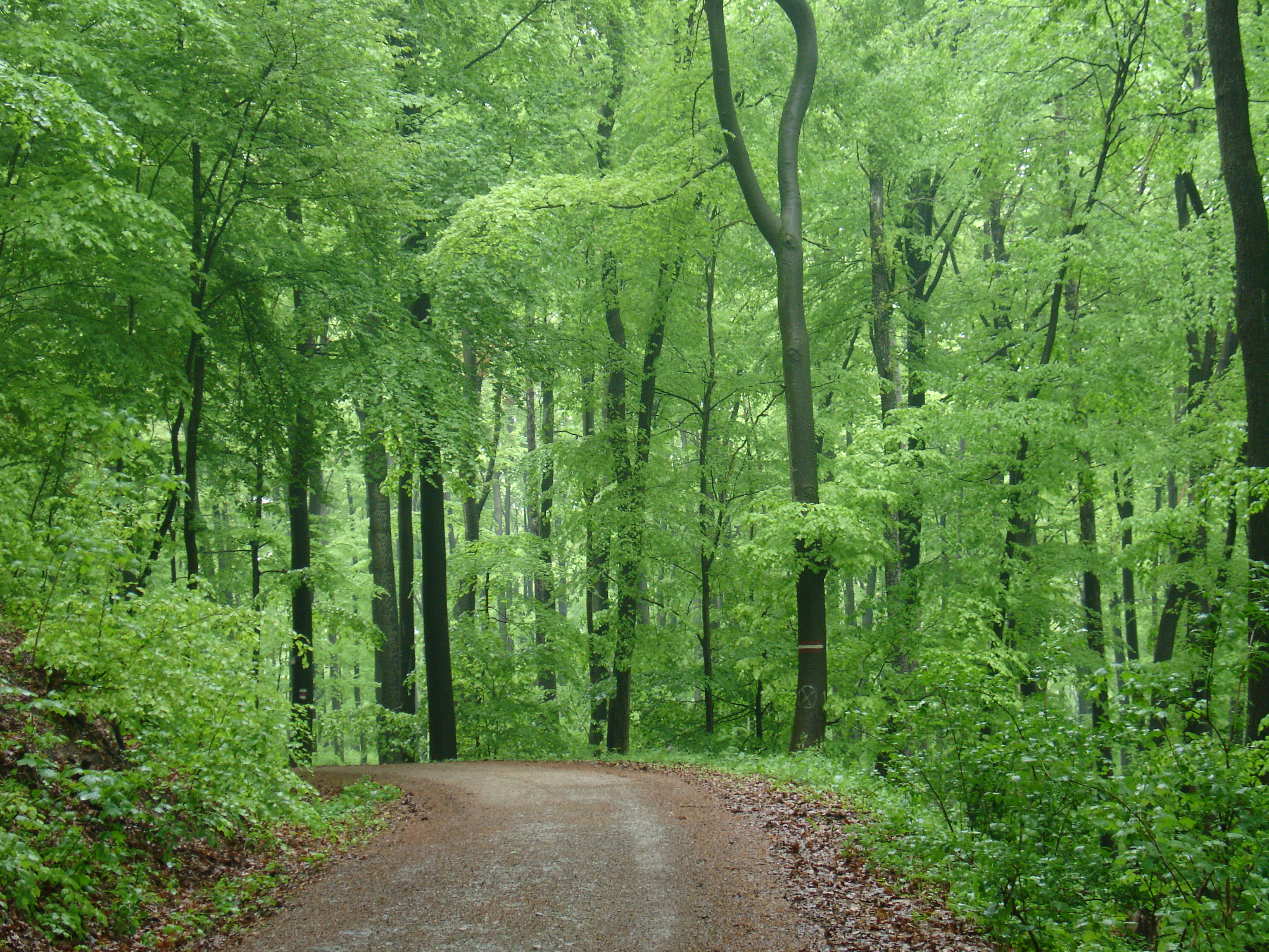 Wienerwald in Breitenfurt Ost --Traudi31 05:50, 30 August 2006 (UTC)